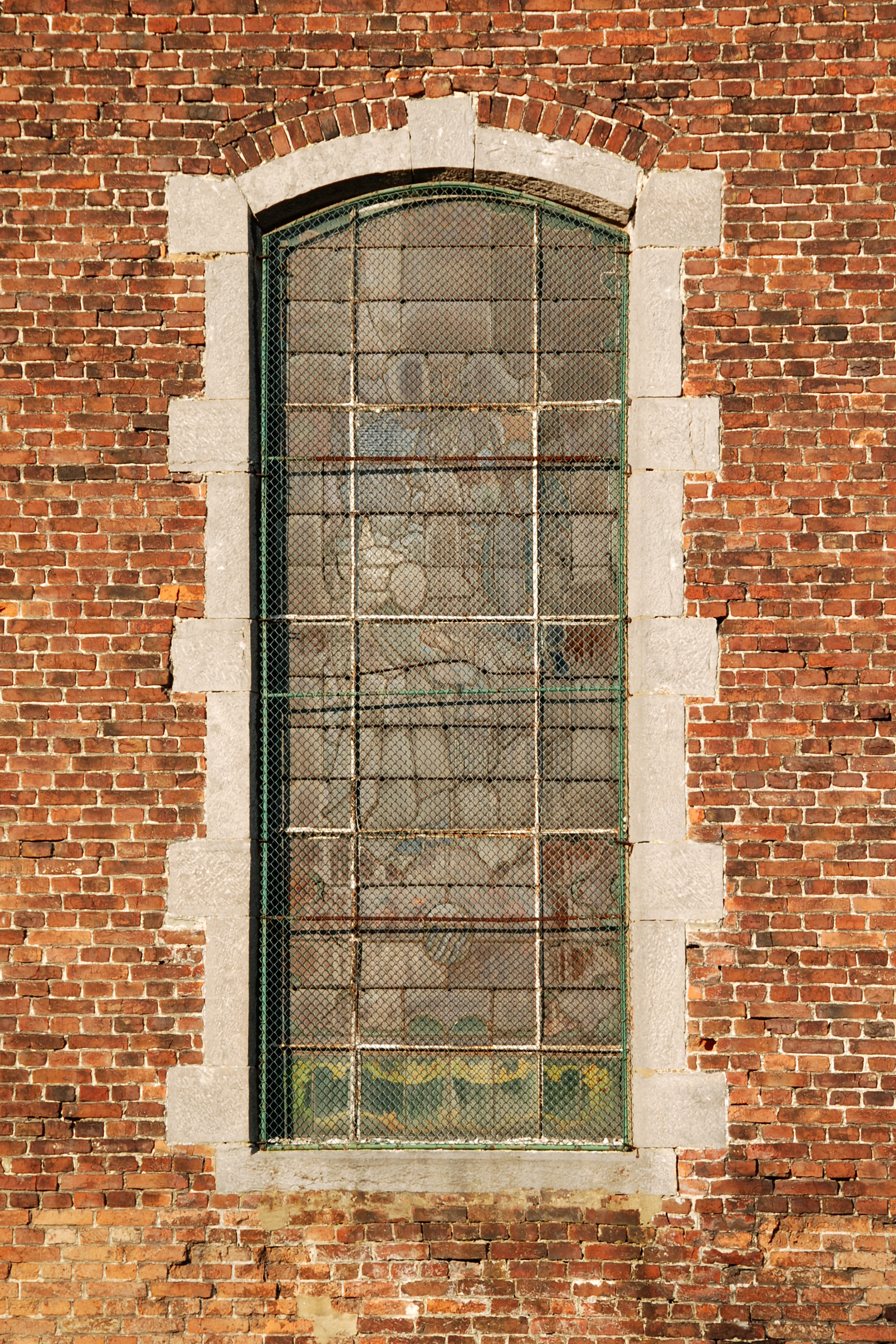 Belgique - Brabant wallon - Église Saint-Martin de Ways